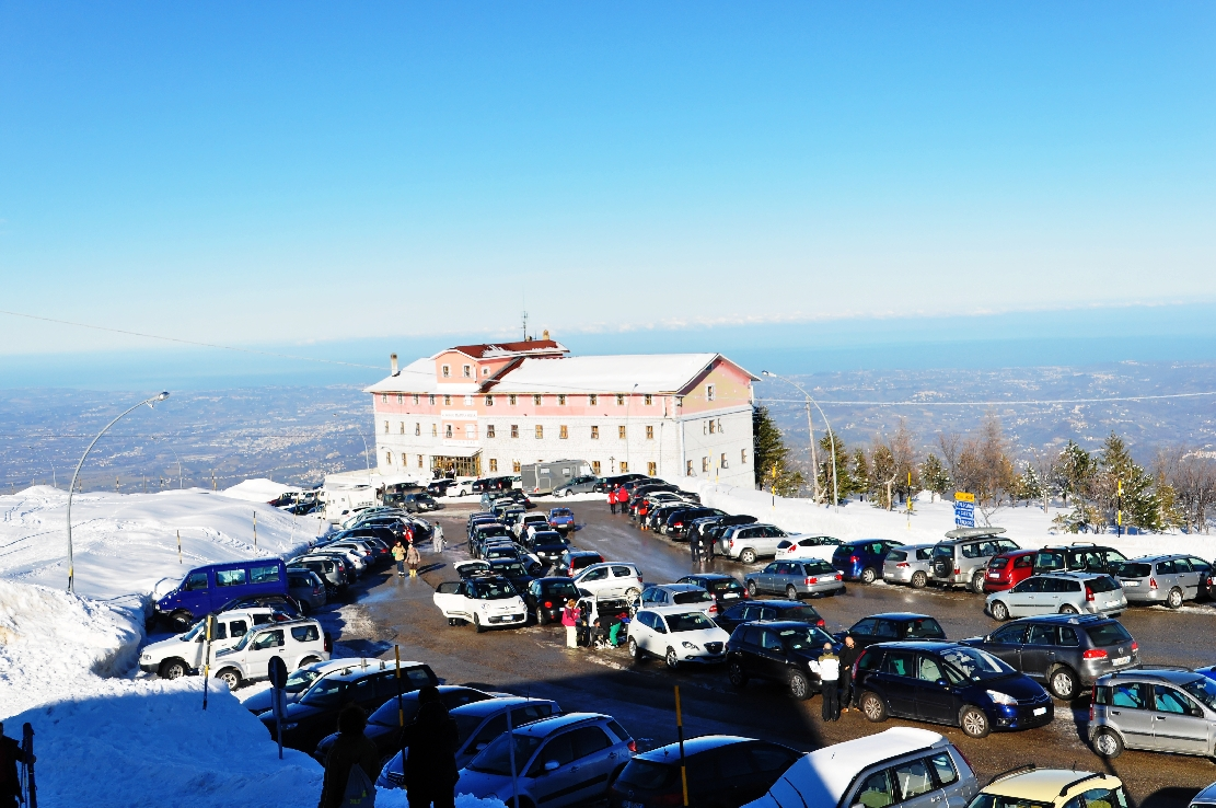 Majella National Park Winter 2013